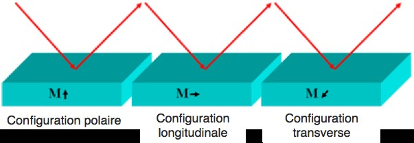 Les différentes configurations de l'effet Kerr (longitudinal, polaire et transverse)